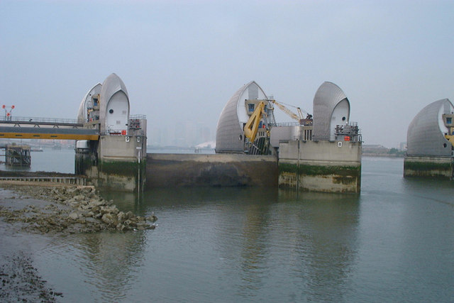 Thames Barrier under test